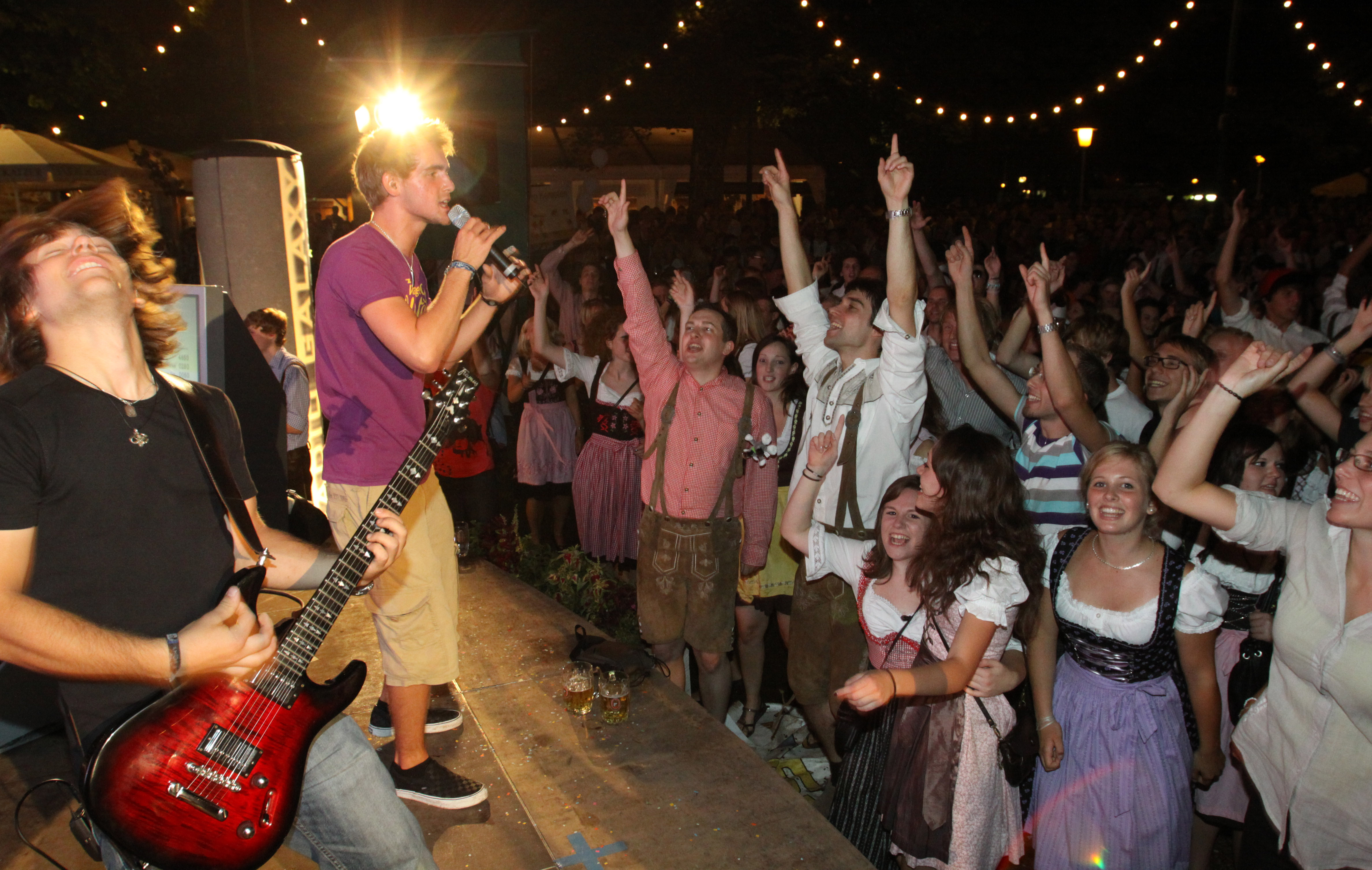 Allgäuer Festwoche Kempten